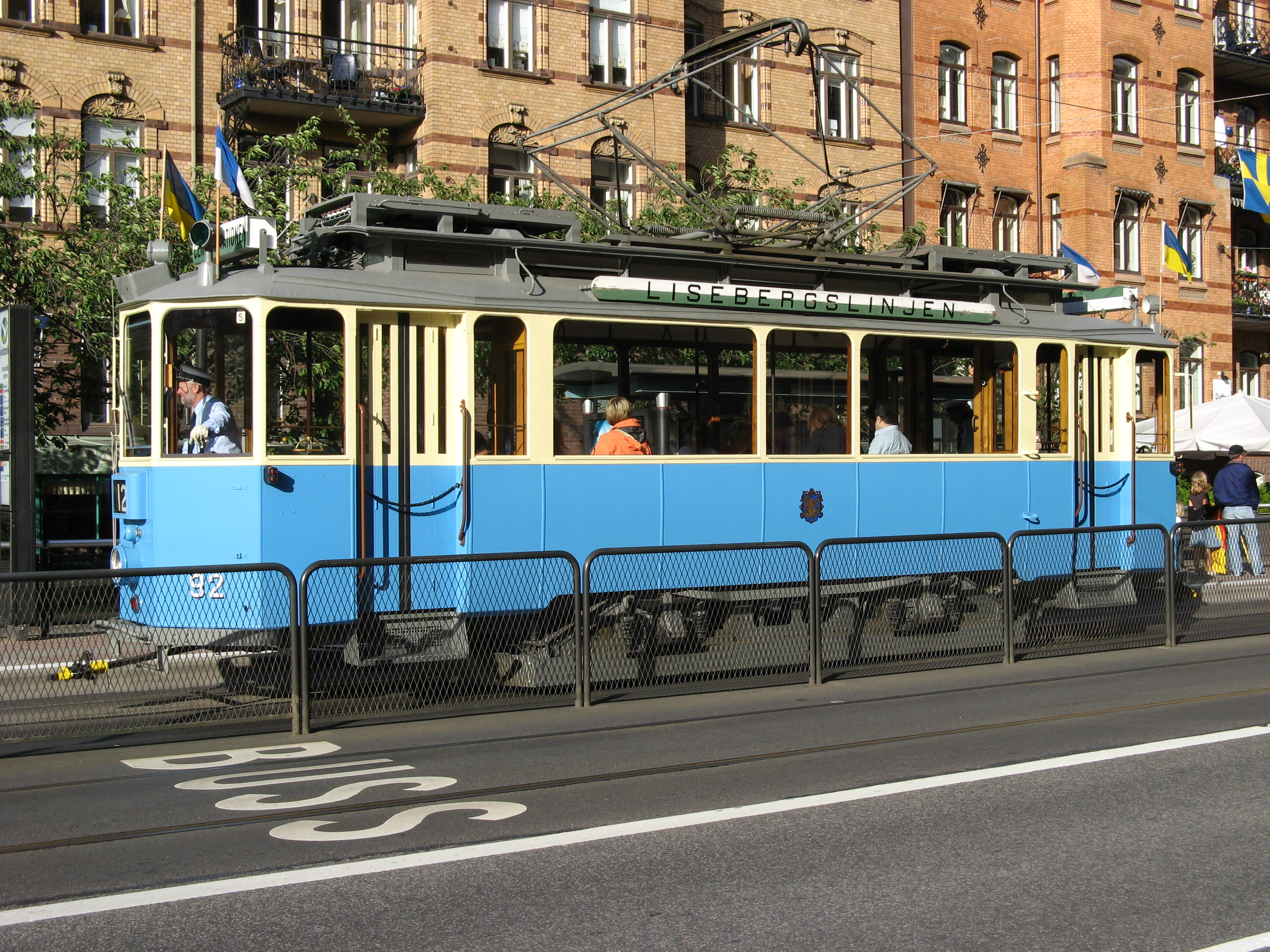 Tram in Gothenburg